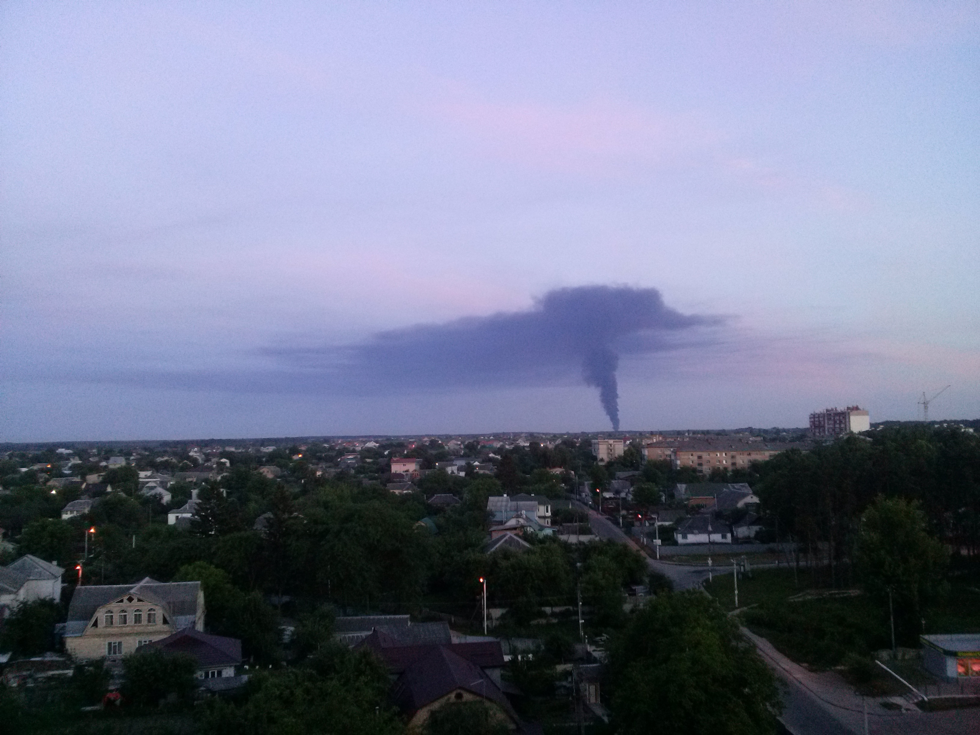 Пожежа на нафтобазі біля Крячок 8.06.2015